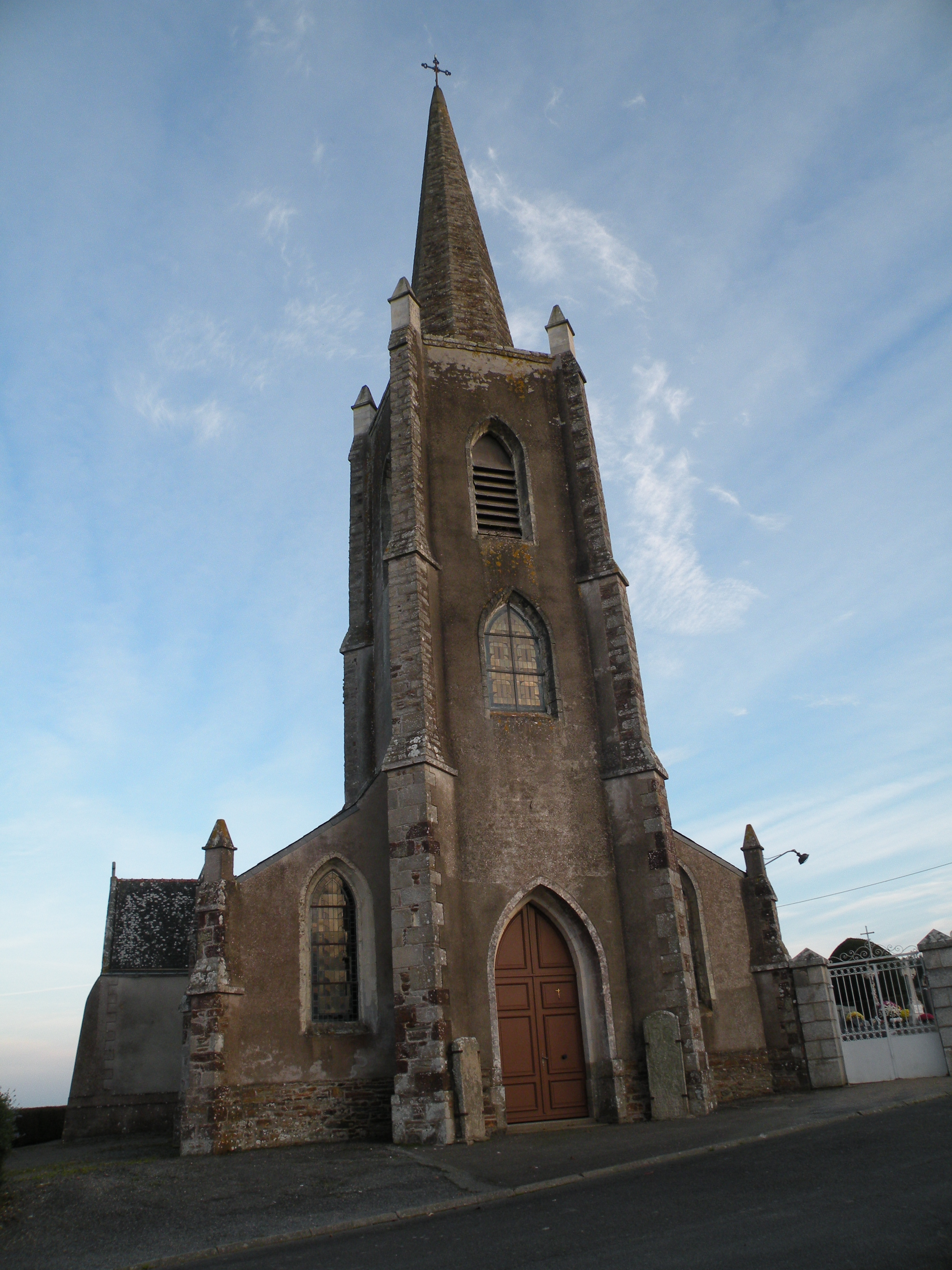 Église Saint-Pierre-du-Moutier de Théhillac.